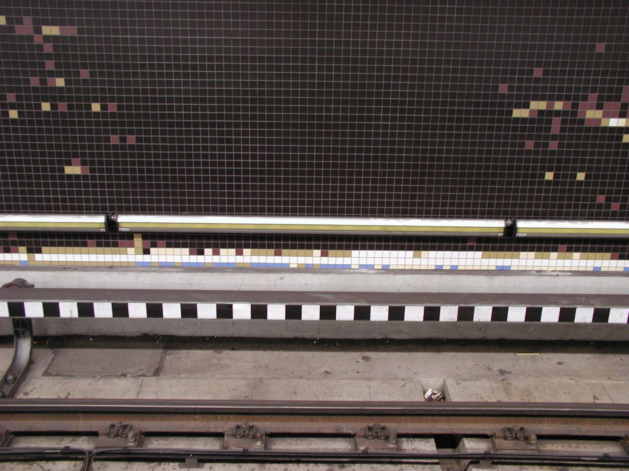 BGÜ-Einheit(Bahnsteig-Gleis-Überwachung) U-Bahnhof Nürnberg Rathenauplatz.